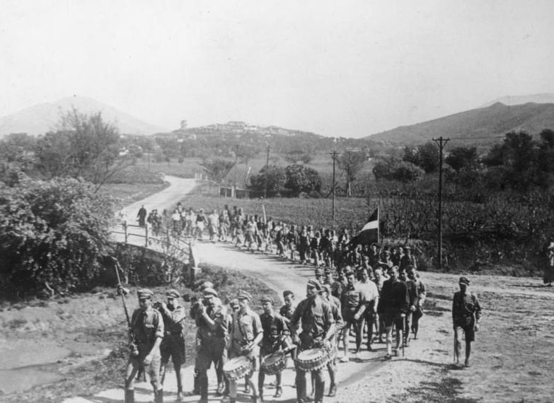 Osterfahrt der SA und HJ Shanghai nach Wusih Osterfahrt der SA und HJ Shanghai nach Wusih, im Zeltlager [Foto erworben durch NSDAP Shanghai 1935] [China, Wusih.- Osterfahrt der SA und HJ]